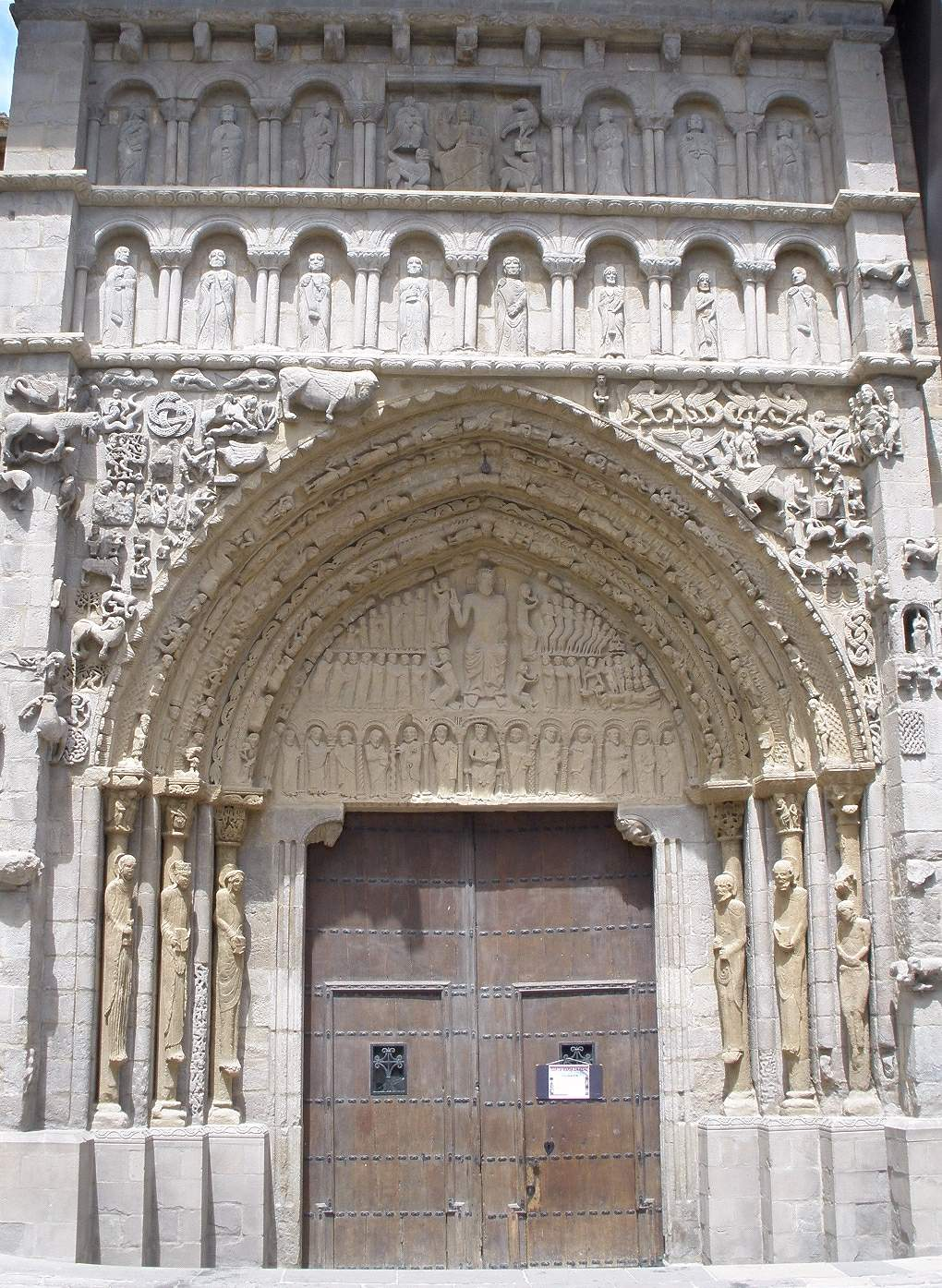 Portada de la iglesia de Santa María la Real, Sangüesa (Navarra)